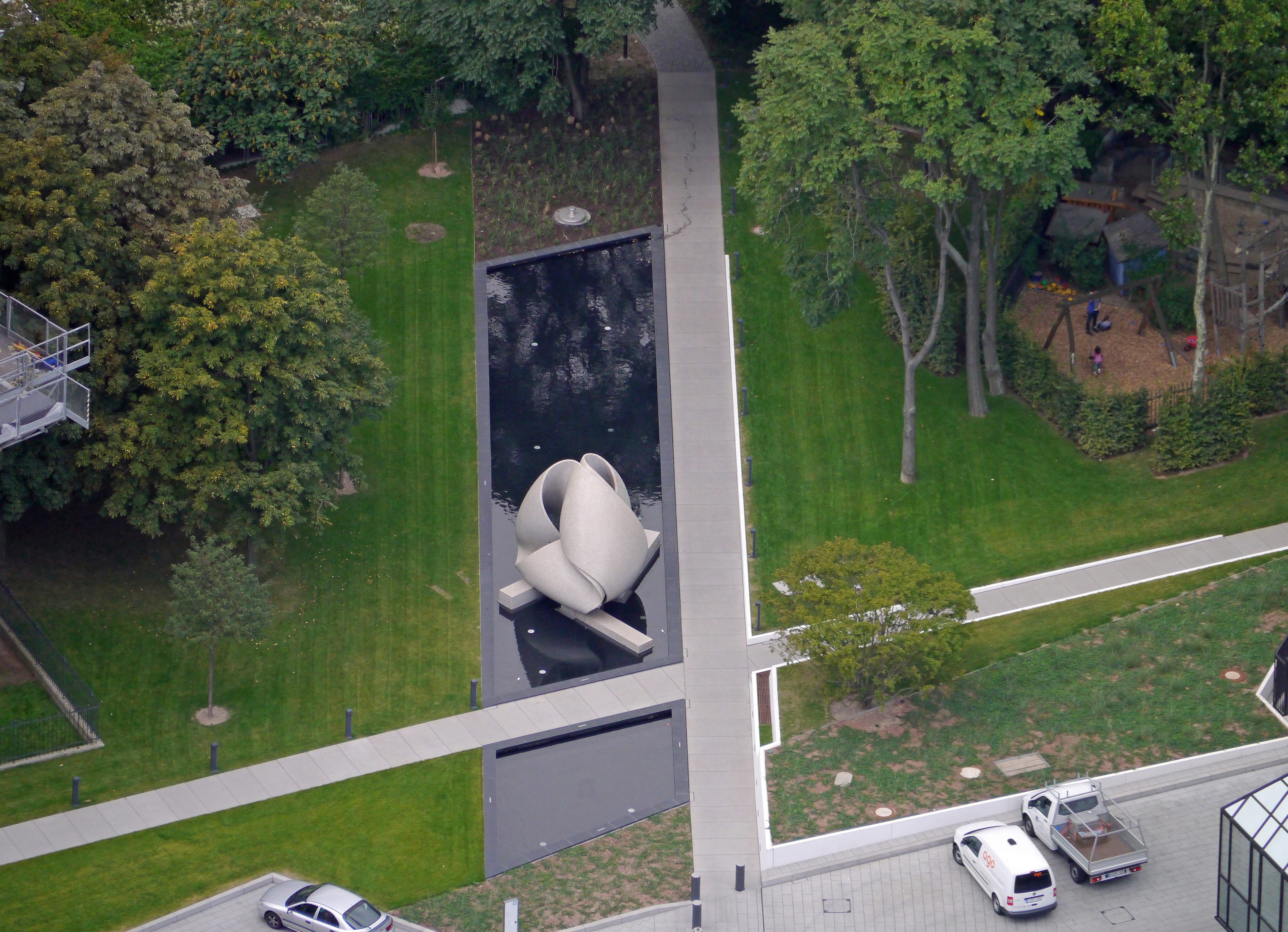 Skulptur Kontinuitaet, 1986 von Max Bill, 2012 auf dem Grundstueck der Deutschen Bank in Frankfurt am Main.